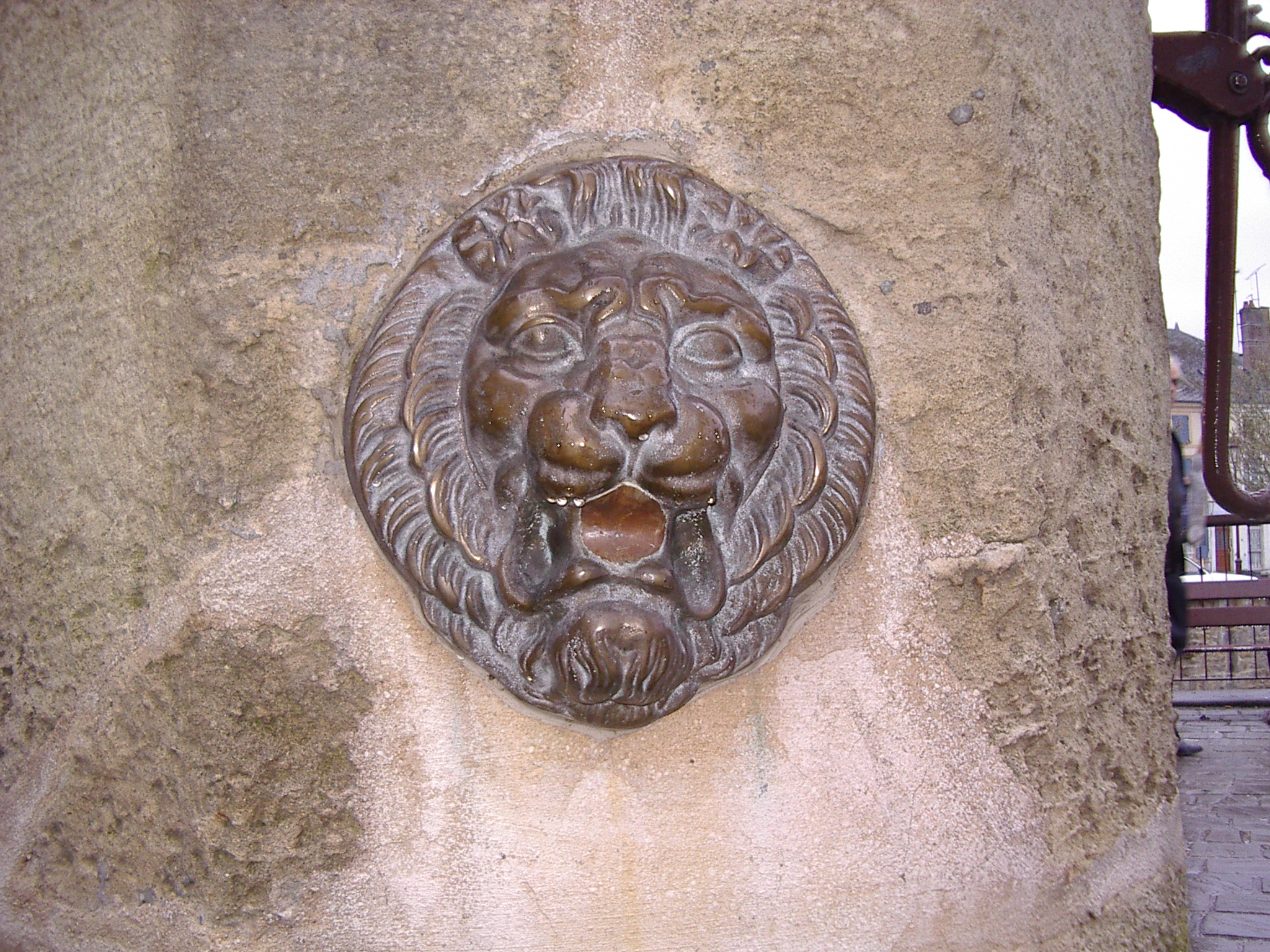 Medaillon sur ancienne fontaine-Vrigne-aux-Bois-Ardennes-France